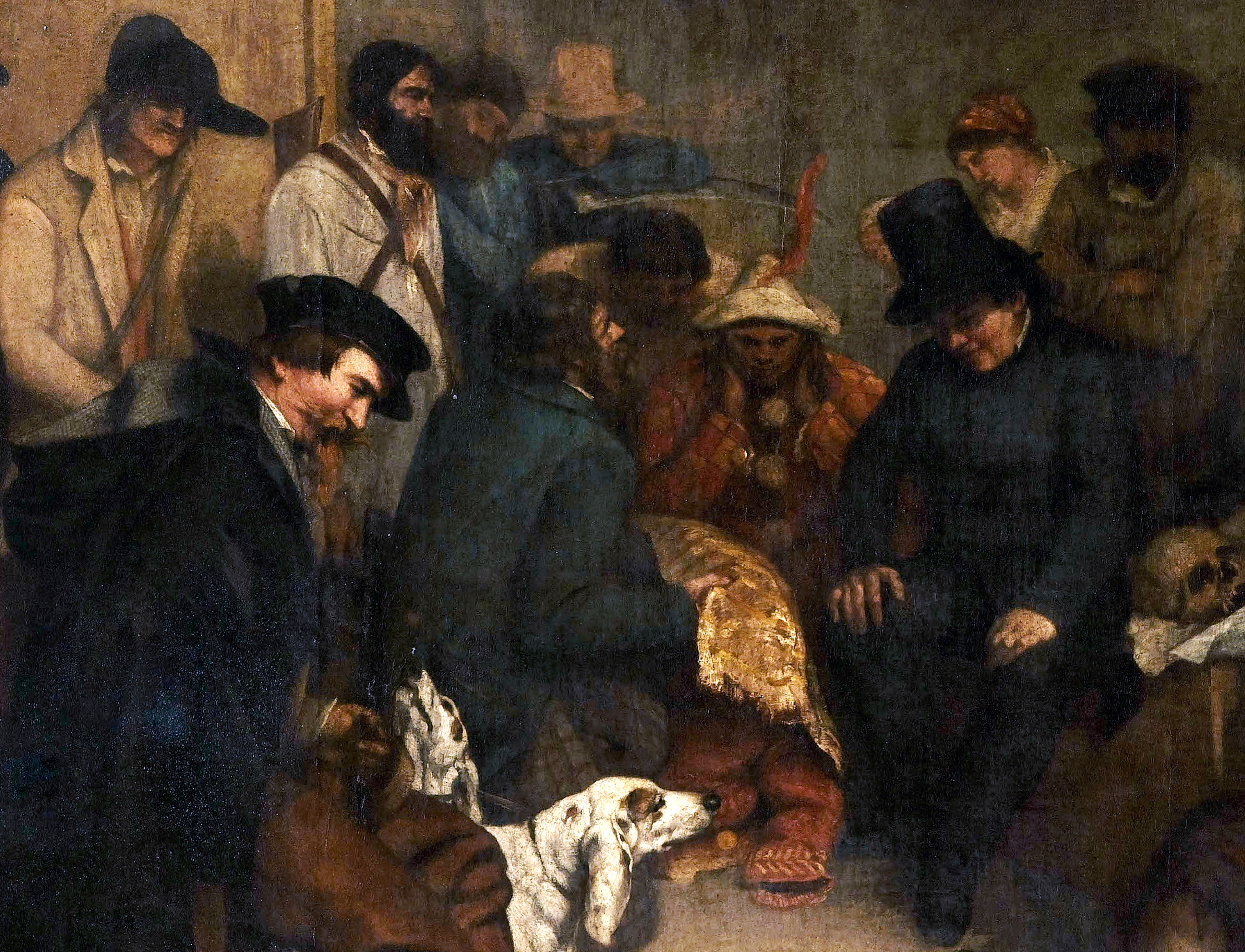 detail (left half)